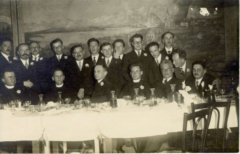 Uredniški odbor Slovenca aprila 1930